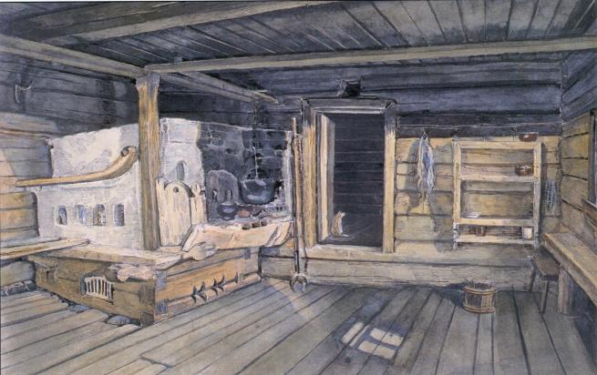 Сойкинский полуостров. Интерьер ижорской избы. Акварель